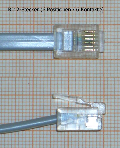 RJ12-Stecker